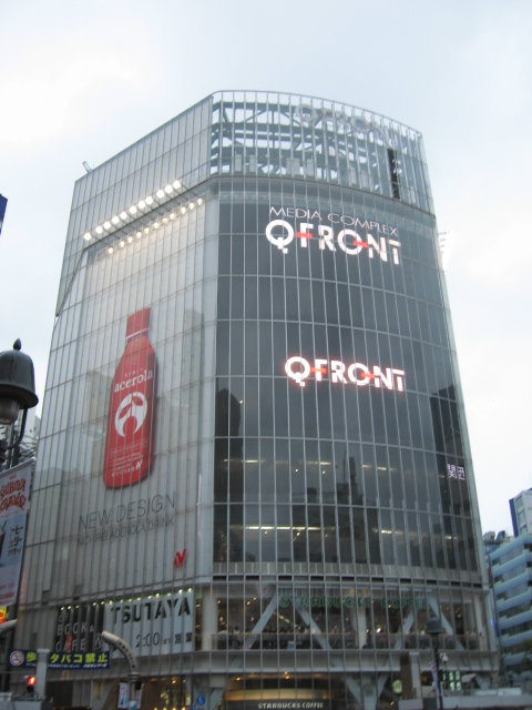 Q-FRONT